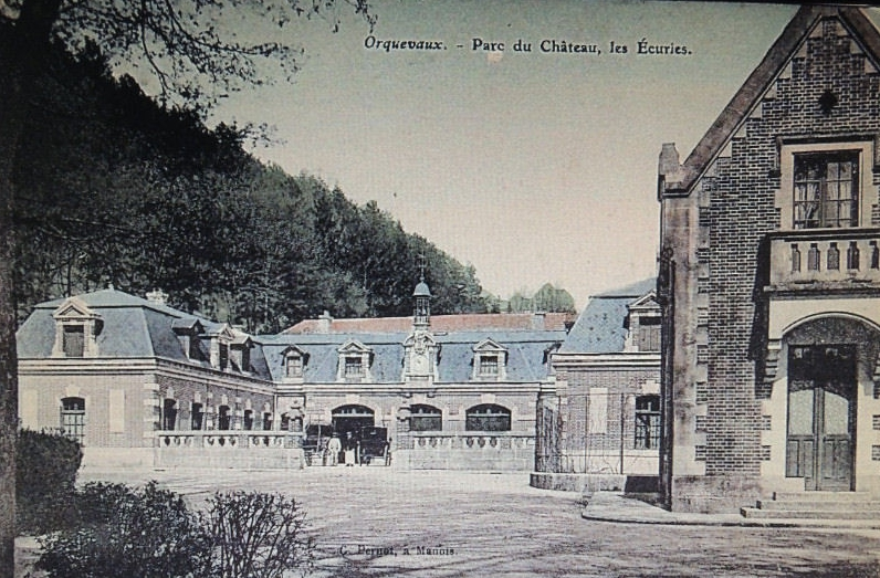 Carte postale du château vers 1910